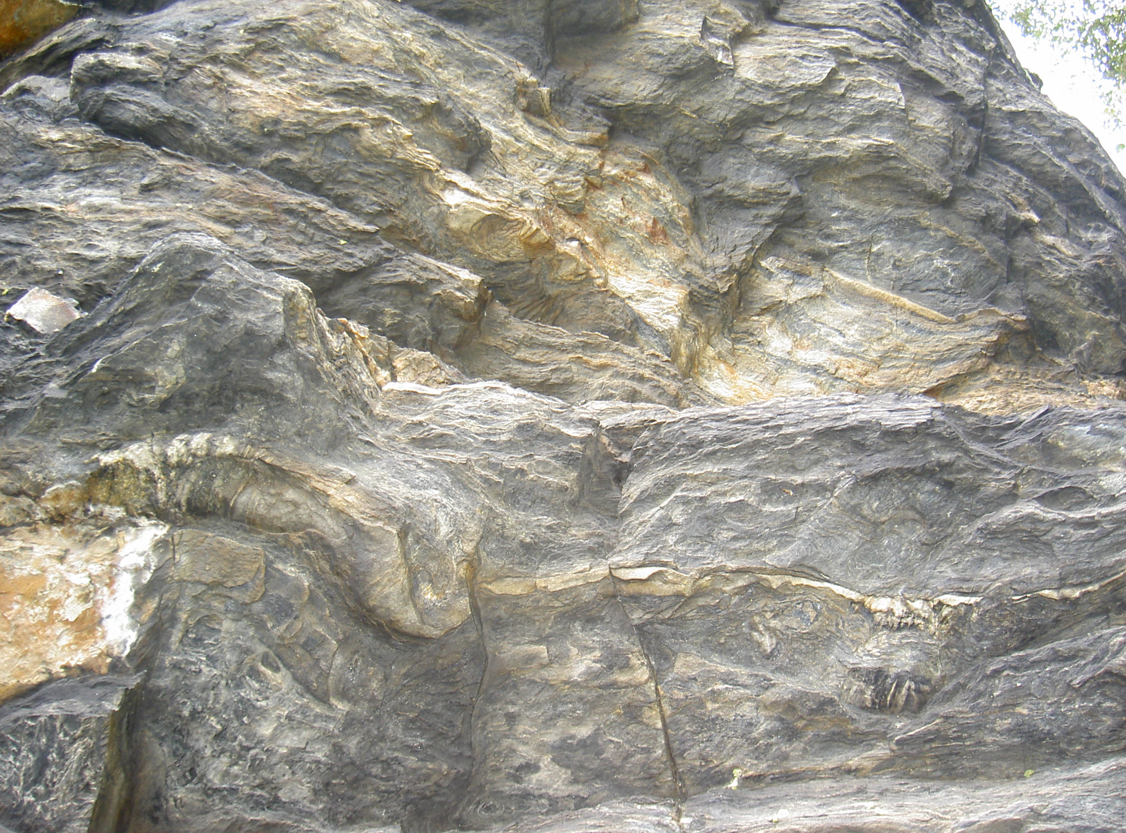 Lerchenbühl (Neualbenreuth)